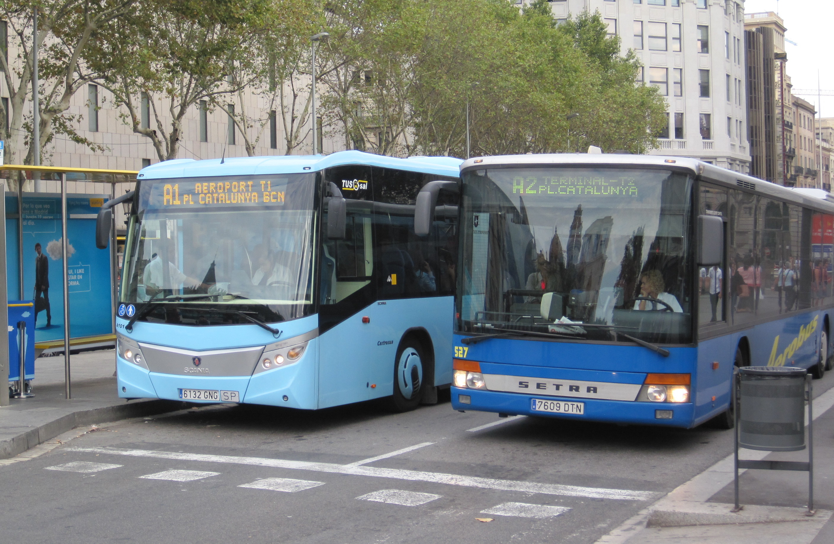 Imatge de dos cotxes diferents de les dues línies de l'Aerobús de Barcelona (Plaça Catalunya, 2009).